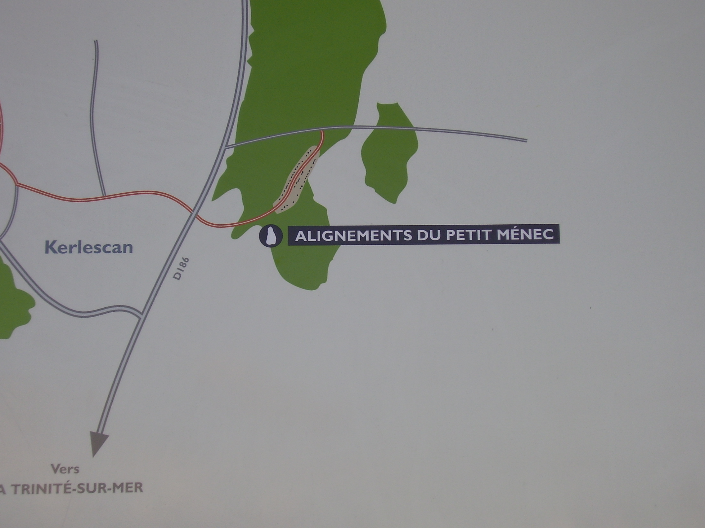 Carnac, France